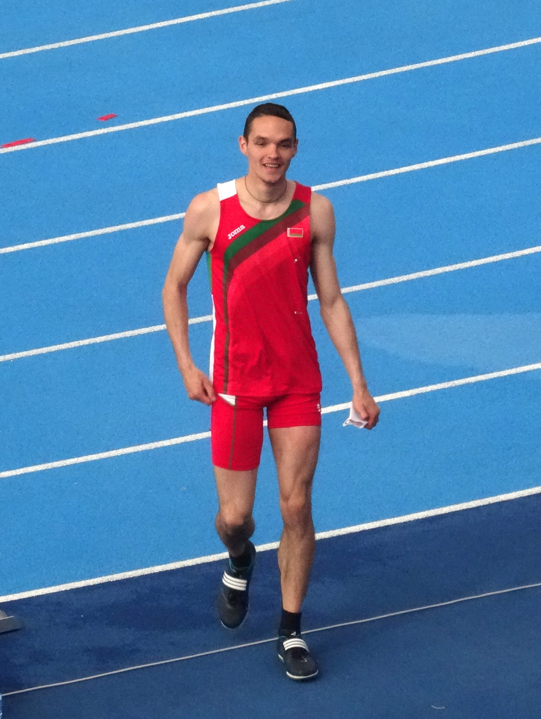 Młodzieżowe Mistrzostwa Europy w Lekkoatletyce U23 w Bydgoszczy 13-16 lipca 2017, finał skoku wzwyż mężczyzn